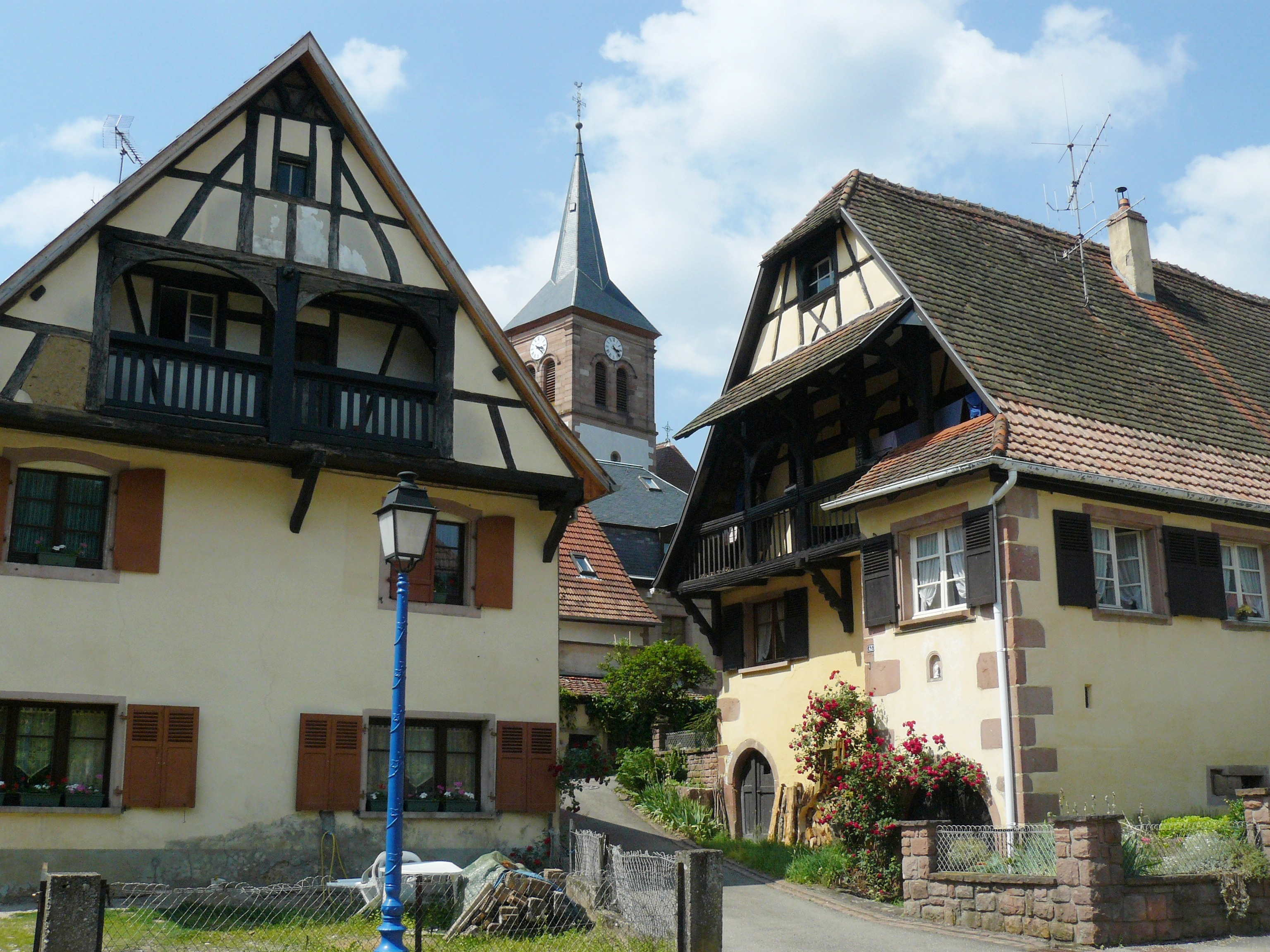 Ensemble de maisons avec un ensemble architecturale exceptionnel